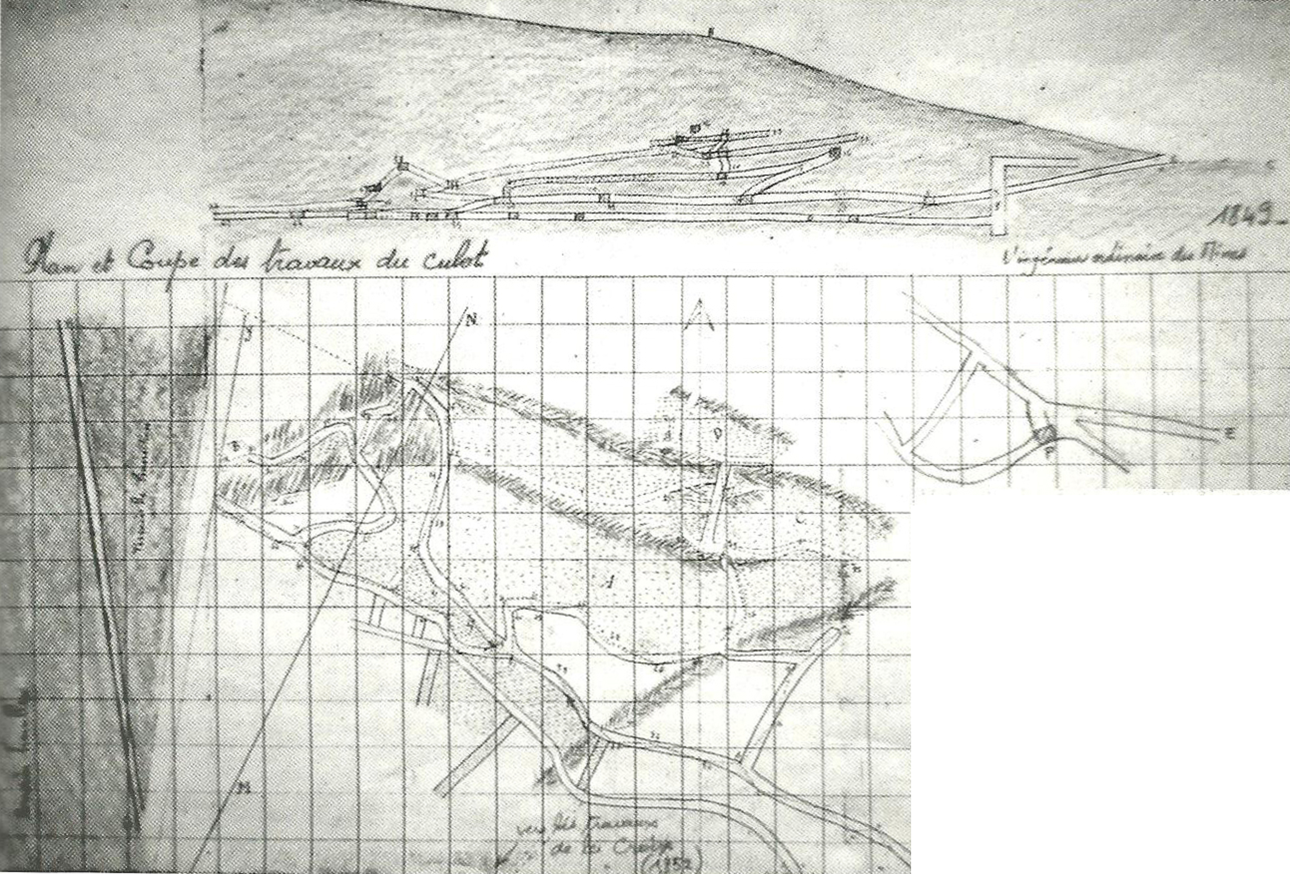 Plan et coupe des travaux minier du Culot à Mourière (Ronchamp).